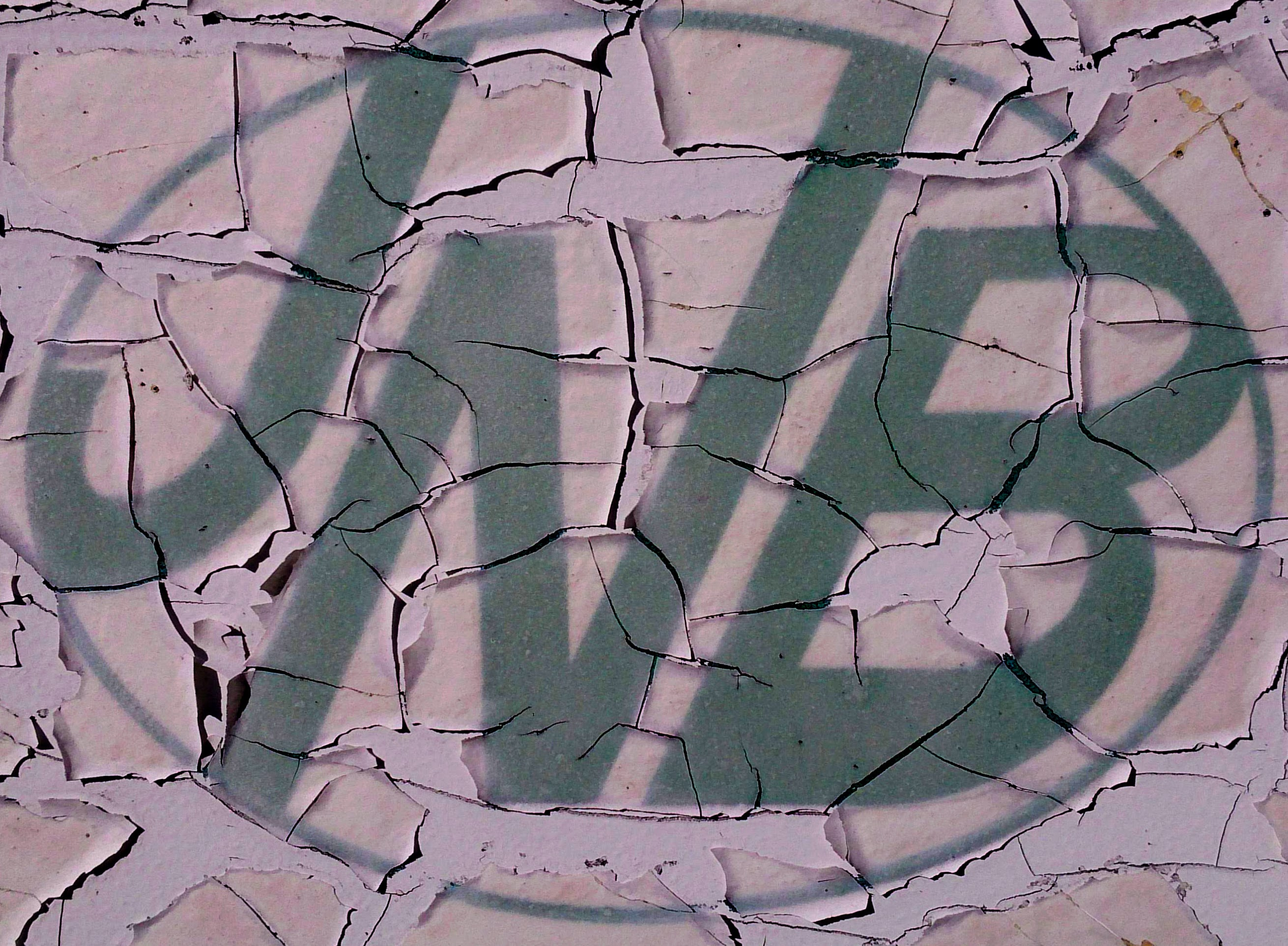 JR新潟ビジネス株式会社のロゴ（宮内駅にて）